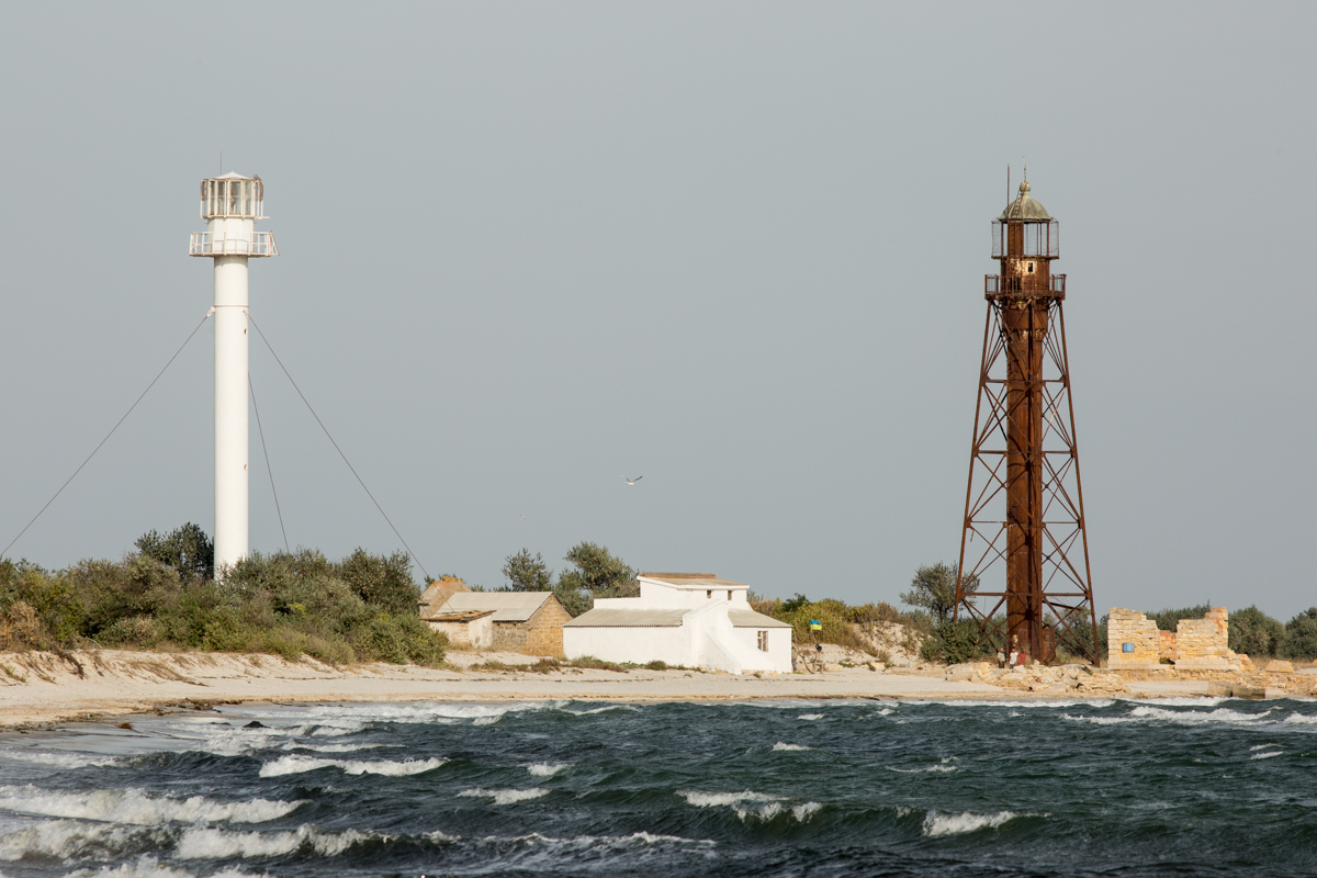 Відзняті на острові Джарилгач під час Вікіекспедиції This photo/video of Dzharylhach was taken during Wikiexpedition to Dzharylhach supported by Wikimedia Ukraine. You can see all photographs in category Category:Wikiexpedition to Dzharylhach. English | українська | +/−